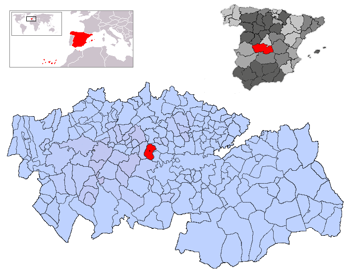 Escalonilla en la provincia de Toledo